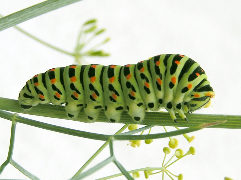 Papilio machaon - Papilionidae